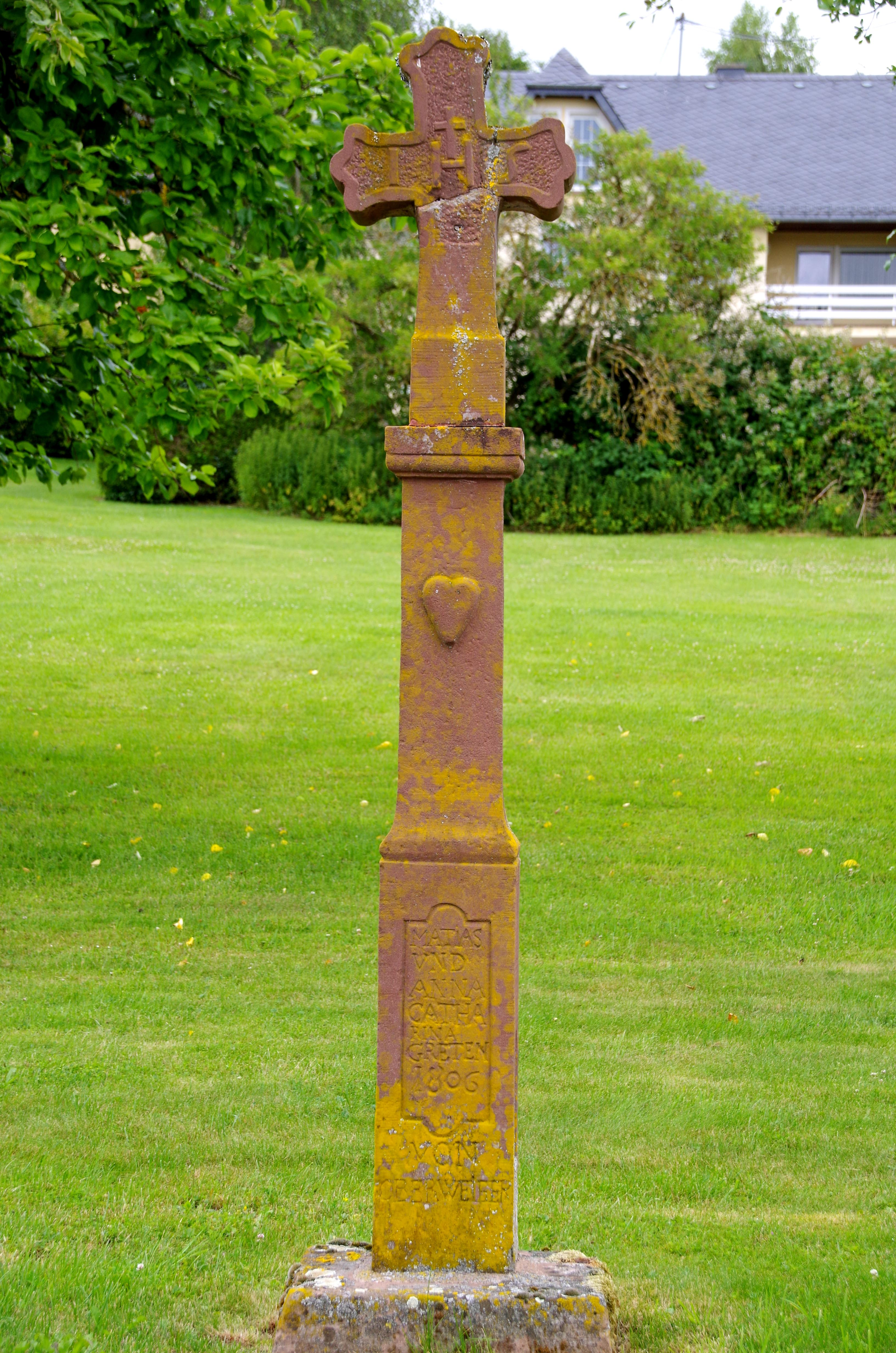 Oberweiler (Eifel), Hauptstraße, Schaftkreuz, Stifter: Mathias und Anna Katharina Greten 1806